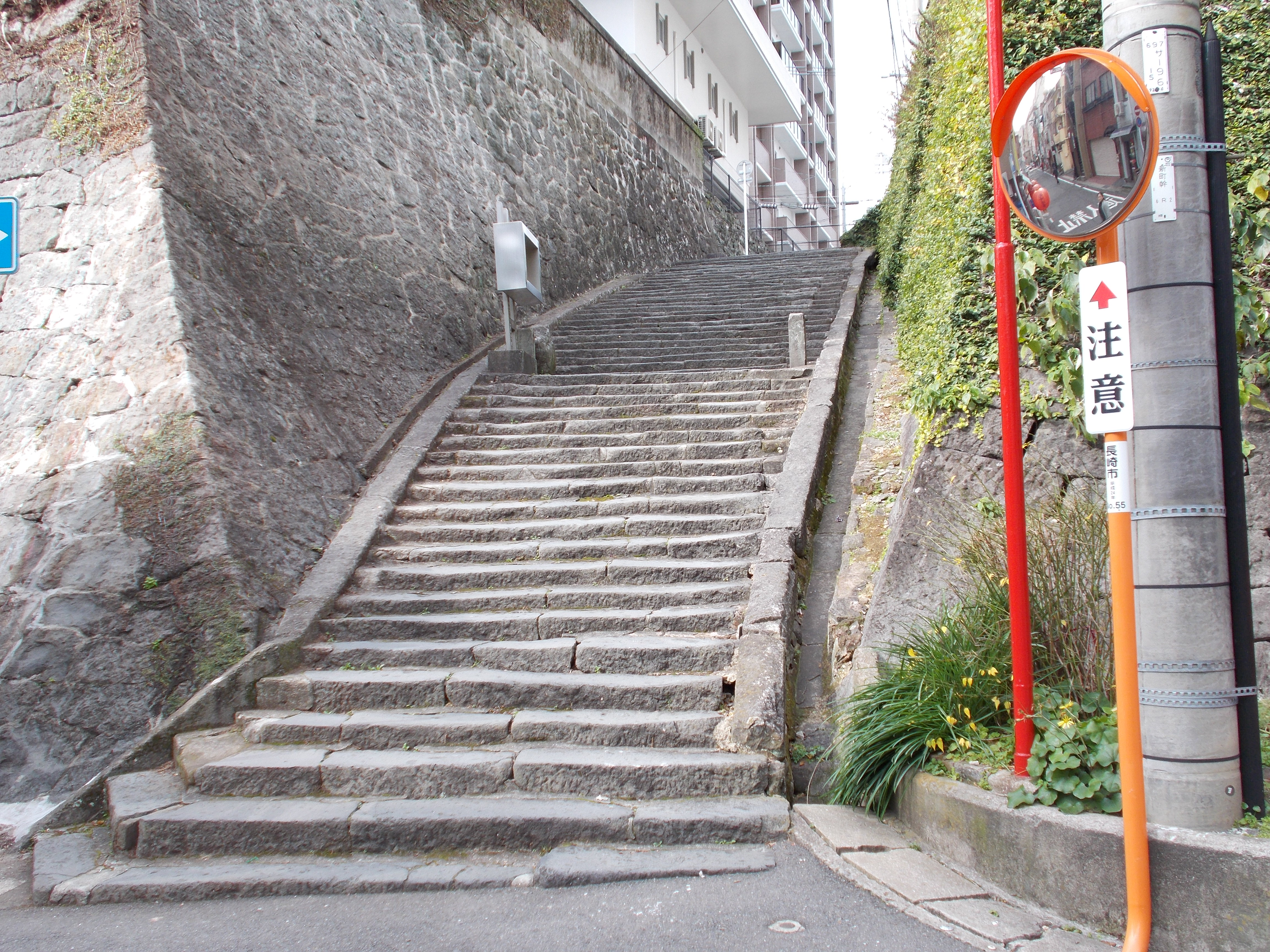 長崎県長崎市万才町 大音寺坂